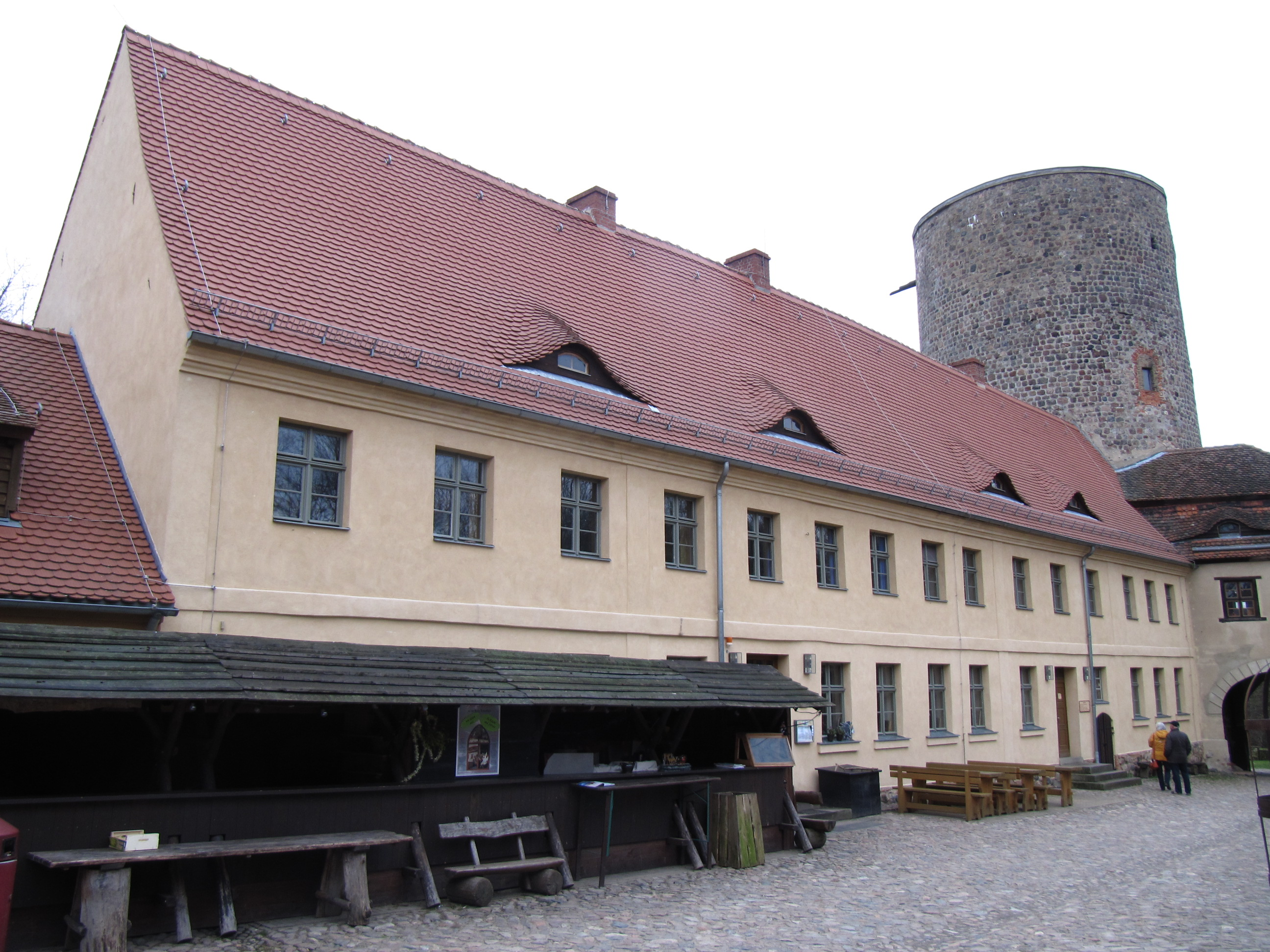 wohnhaus burg rabenstein (fläming)